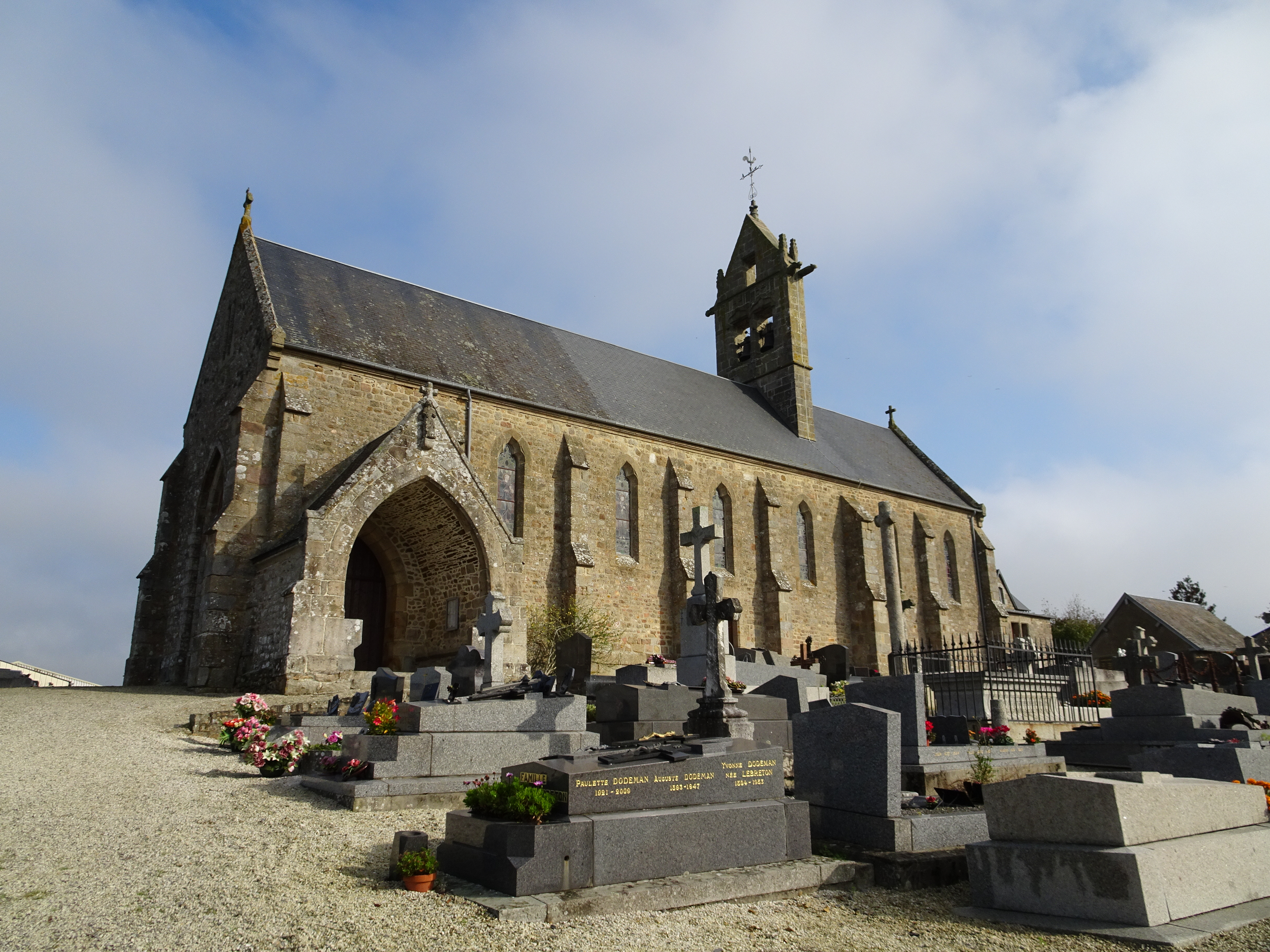 Champeaux, Manche. Eglise et son cimetière.